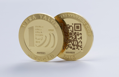 VeraValor, millésime 2012, avers et revers.